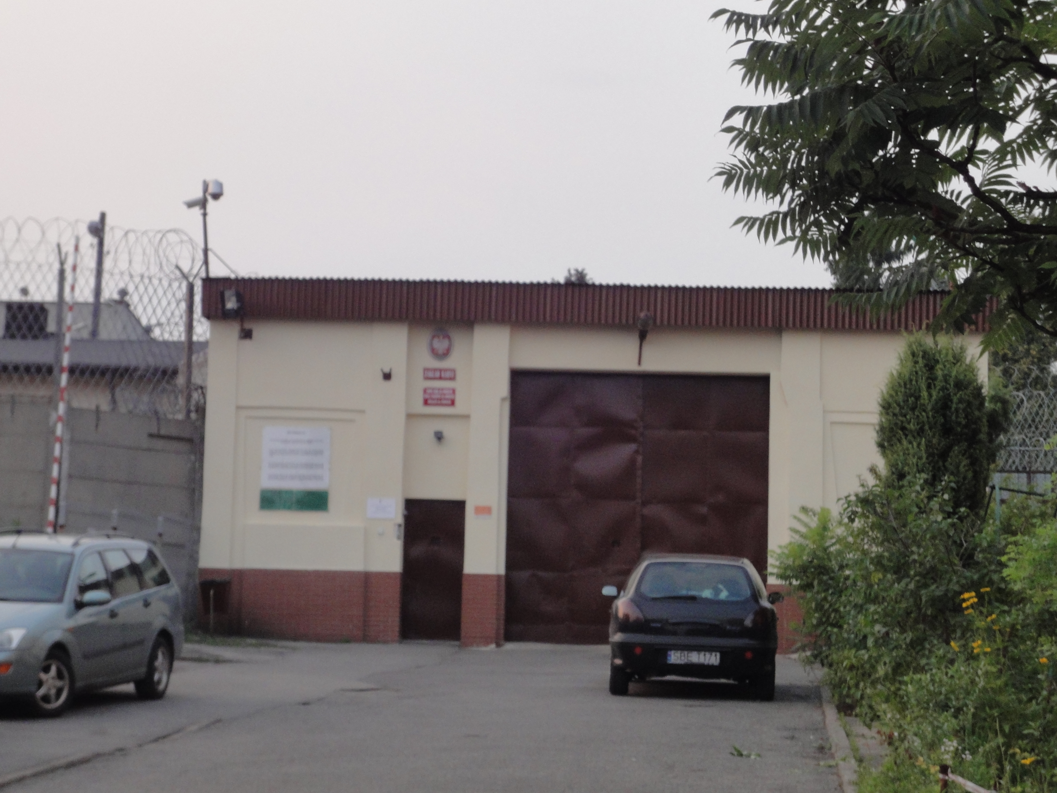 Zdjęcie przedstawia bramę główną prowadzącą do zakładu karnego w Wojkowicach